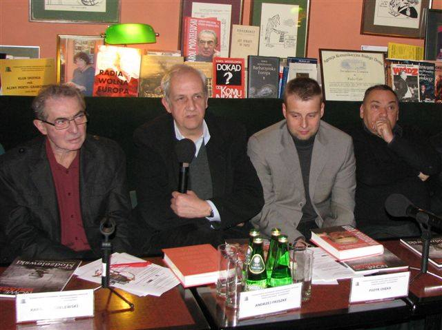 Karol Modzelewski Andrzej Friszke Piotr Osęka Seweryn Blumsztajn